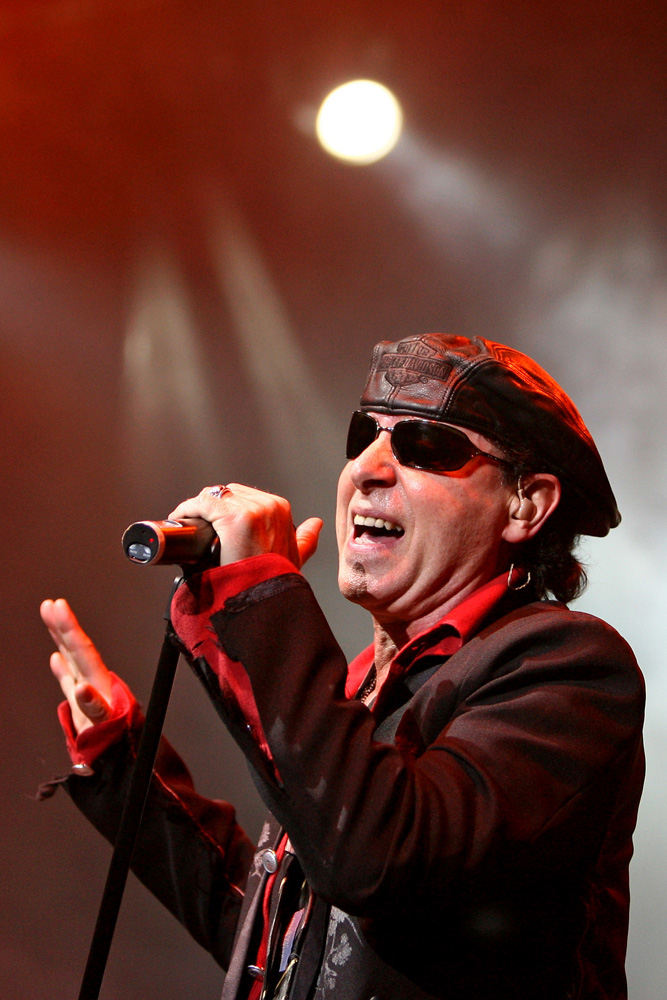 Klaus Meine at Pavilhão Atlântico 04 Nov 2007